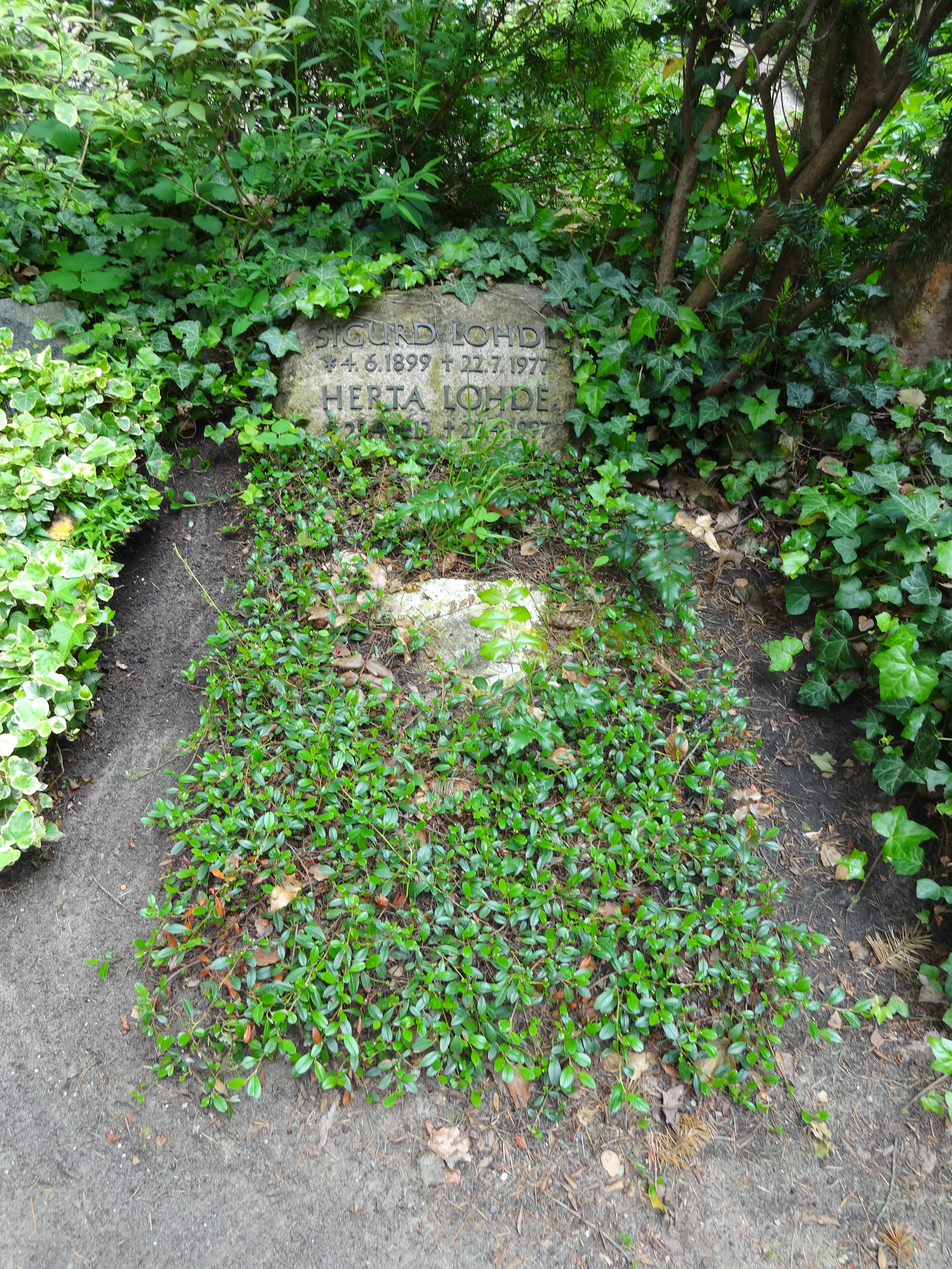 Grab von Sigurd Lohde auf dem Friedhof Heerstraße in Berlin